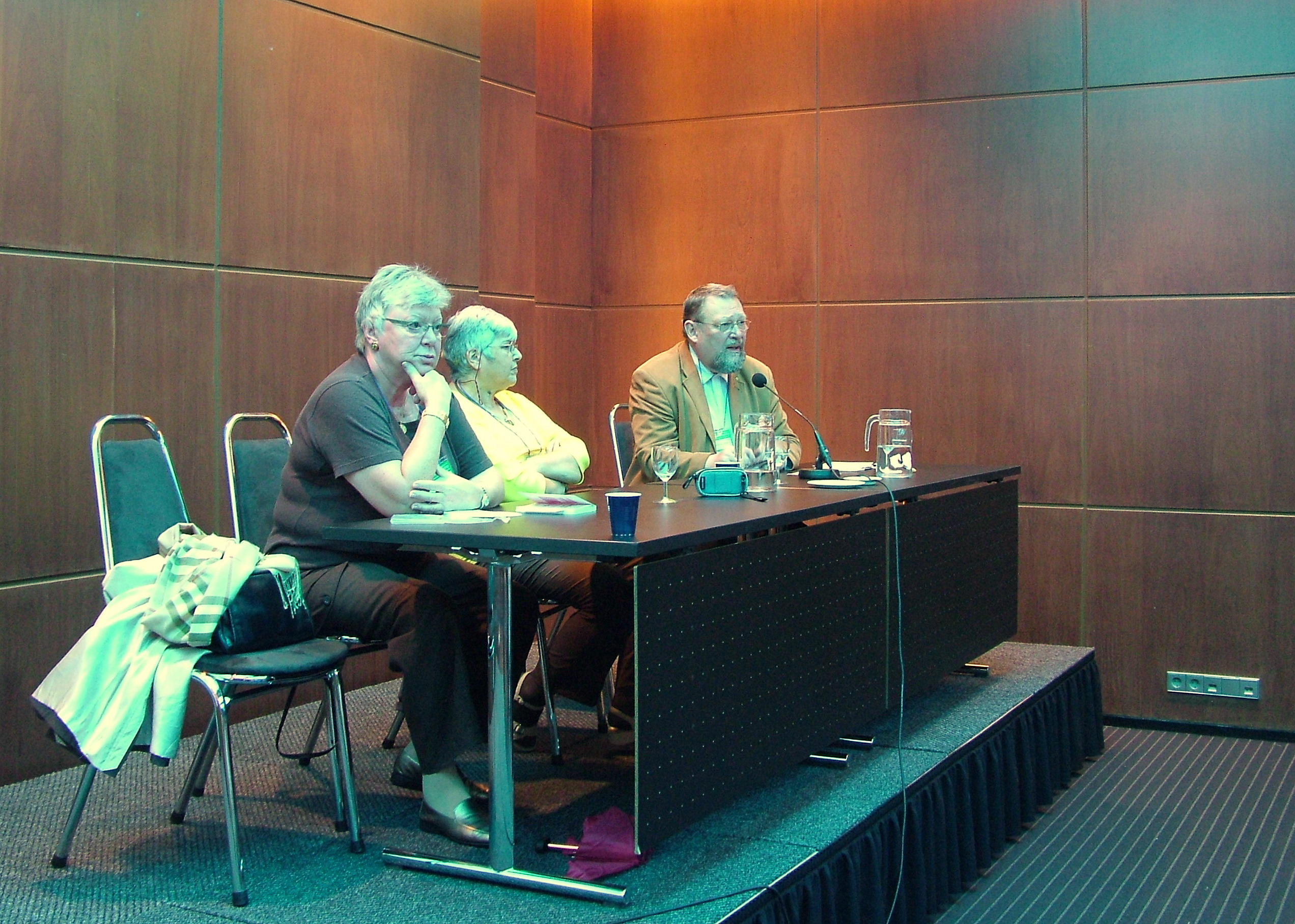 Universala Kongreso de Esperanto, Roterdamo 2008. Eliza Kehlet, Michela Lipari, Hans-Michael-Maitzen: Neoficiala historio de UEA.